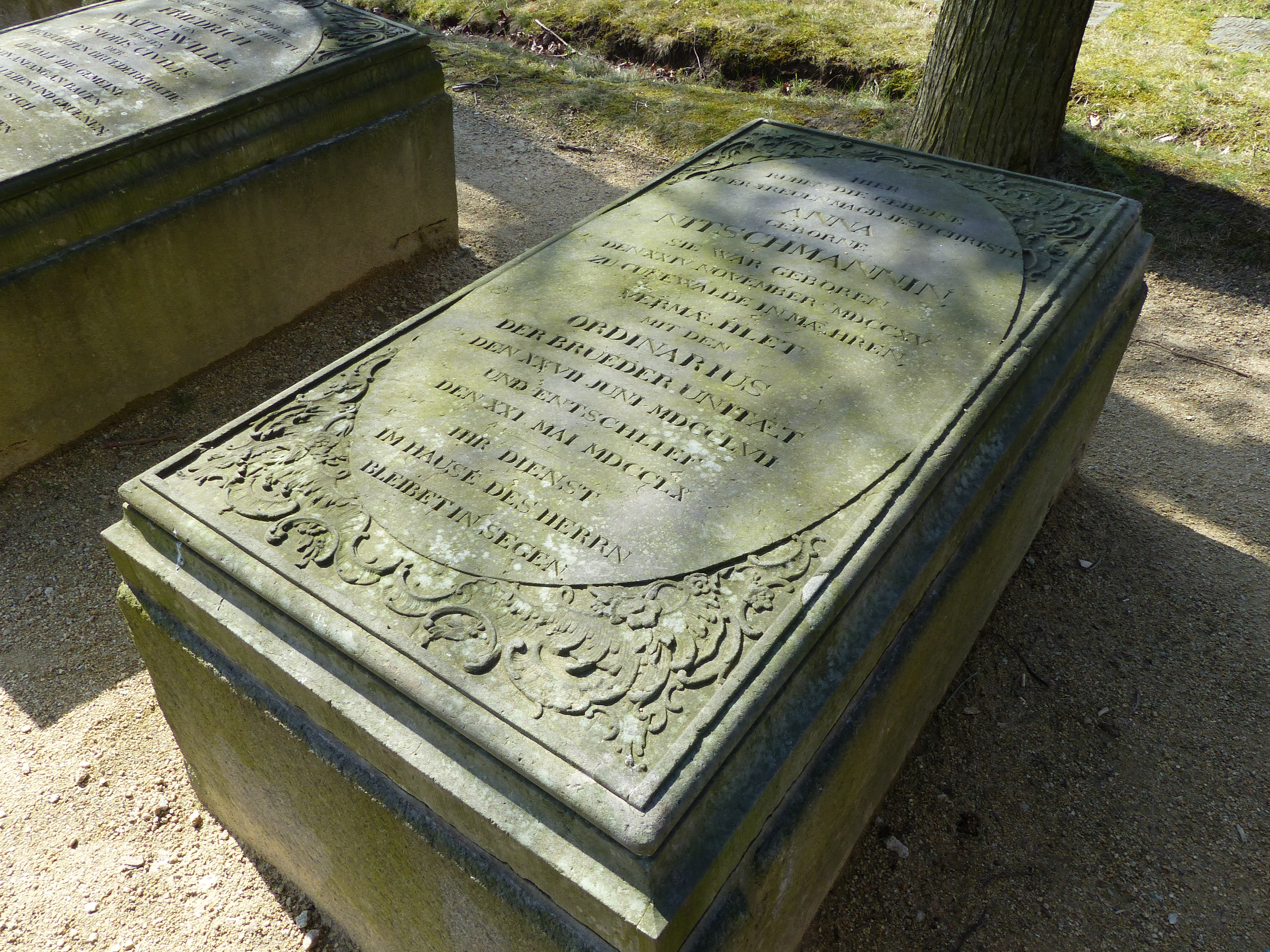 Grab von Anna Nitschmann auf dem Herrnhuter Gottesacker - Friedhof der Herrnhuter Brüdergemeine, Herrnhut